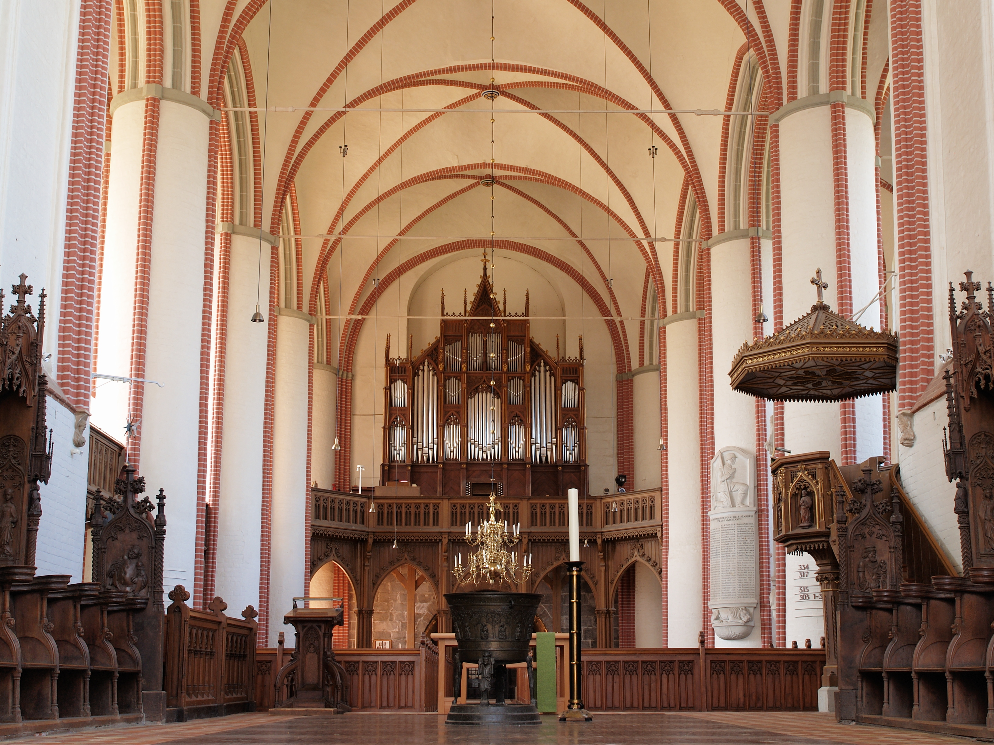 Kirchenraum mit Blick auf die Orgel im Dom in Bardowick bei Lüneburg